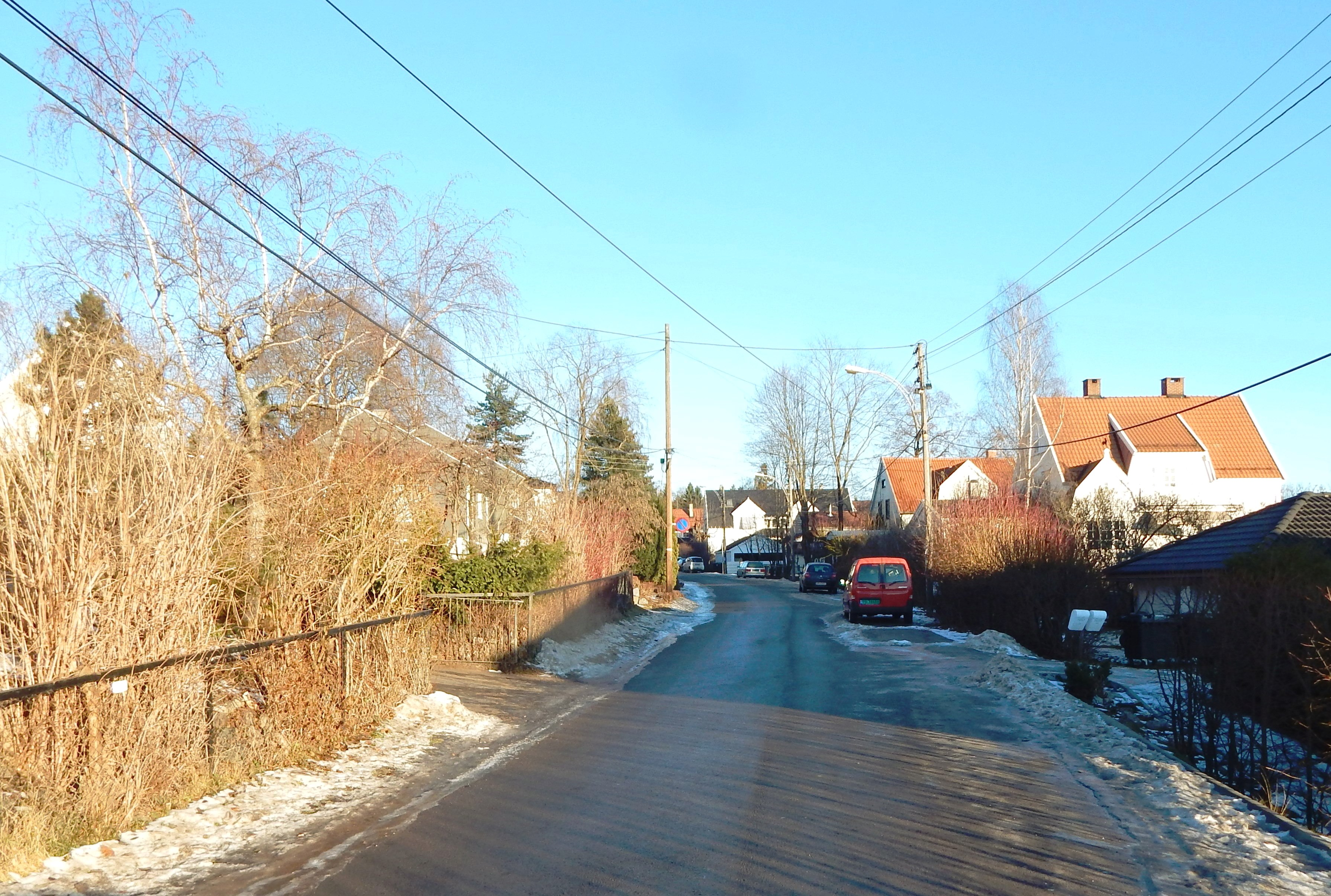 Priorveien nord for Monolitveien